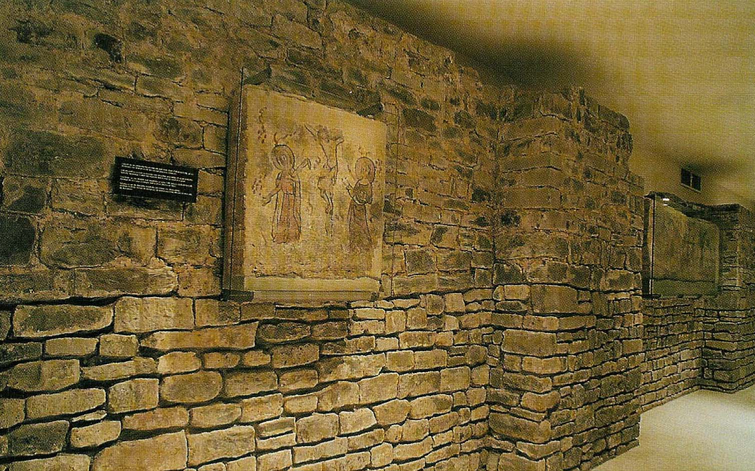 Brugge - Sint-Donaaskathedraal - funderingen van voormalige kathedraal - België